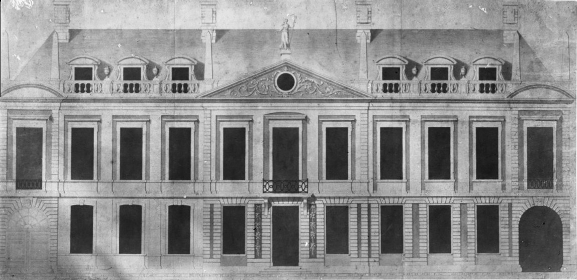 Generaalshuis: 47, voorgevel, naar tekening van Hermans, collectie Jhr. van Riemsdijk